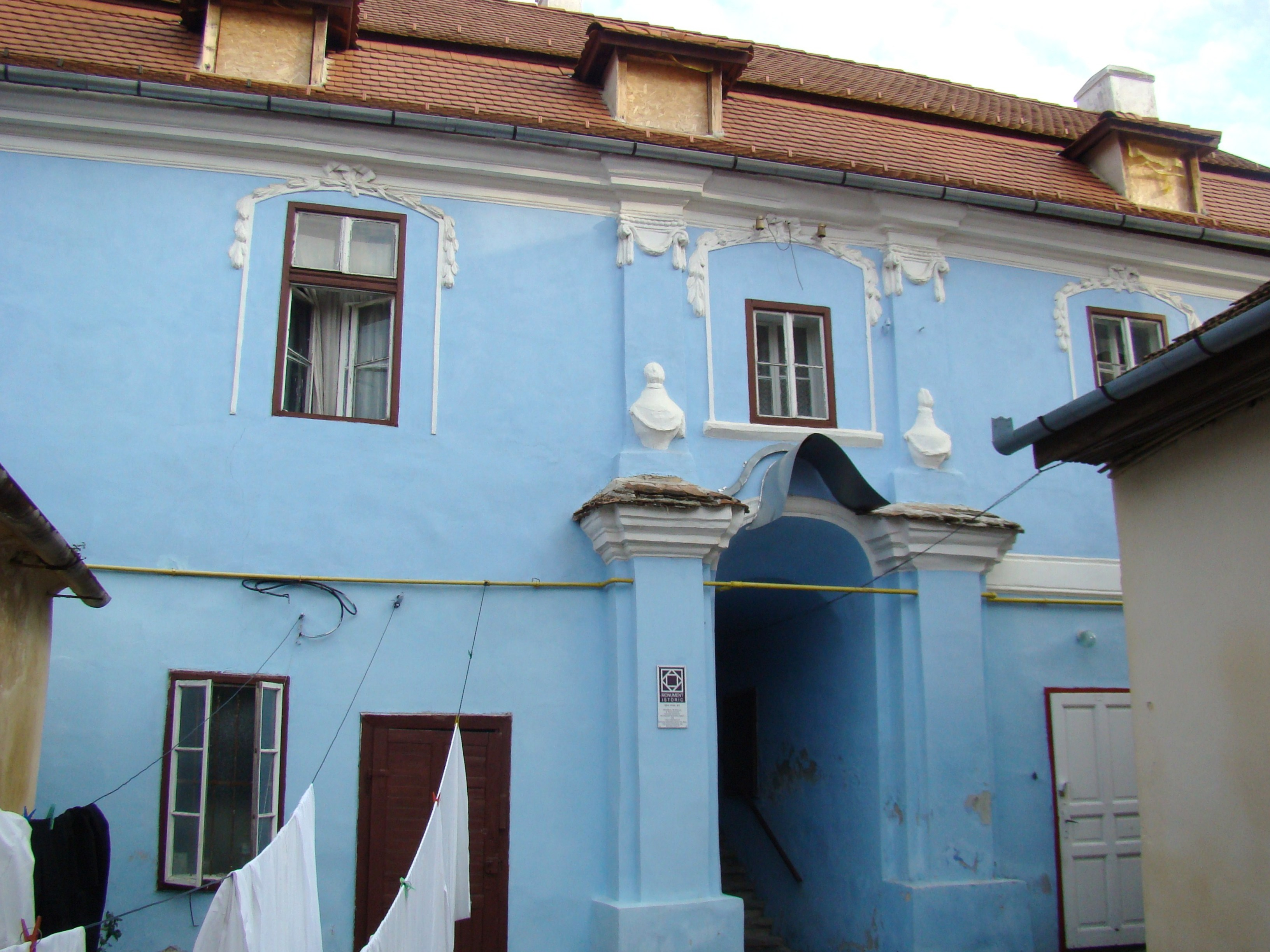 Ansamblul "Mitropolia Ortodoxă și Facultatea de Teologie Ortodoxă"